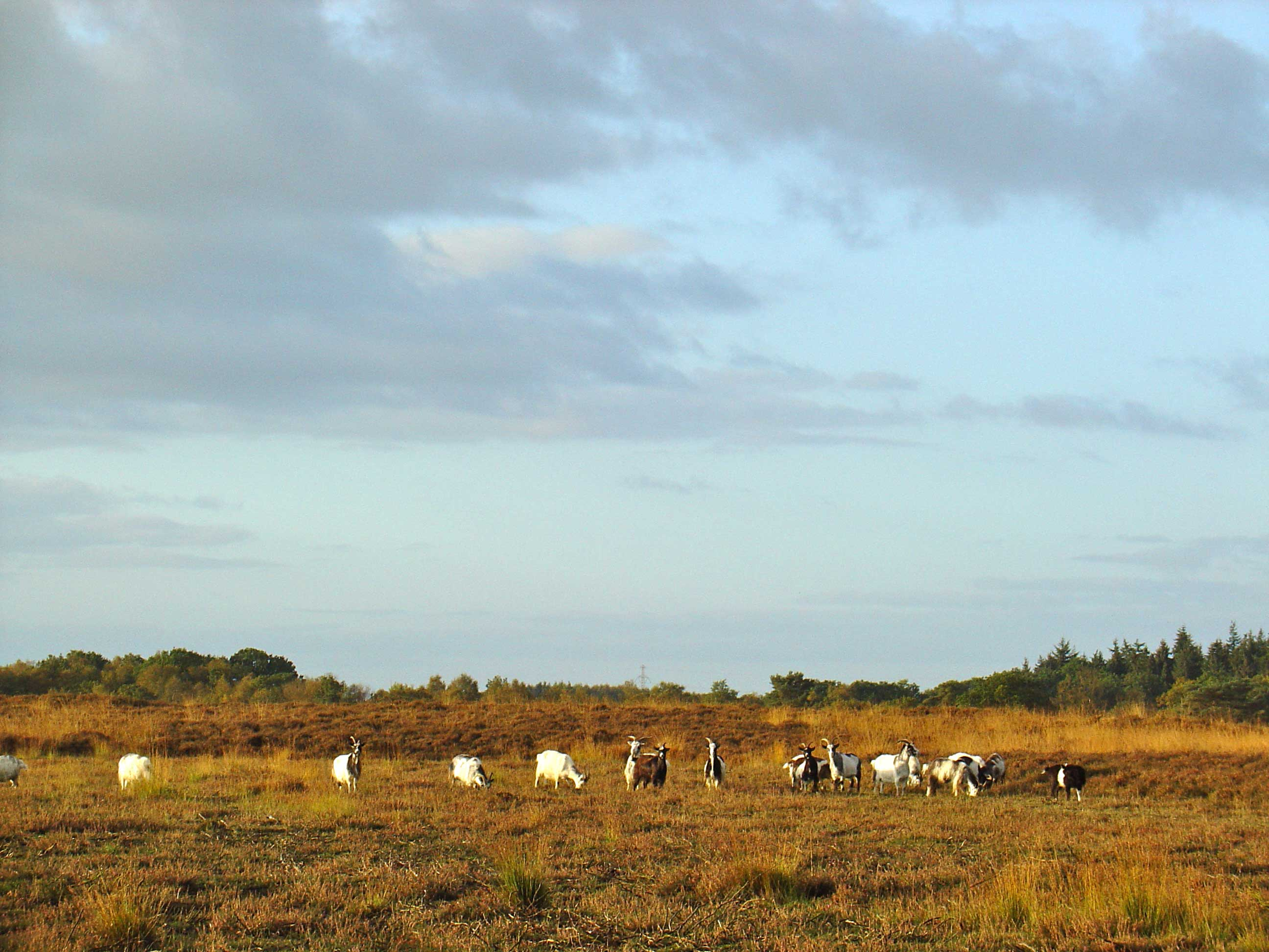 Het Noordsche Veld nabij Peest